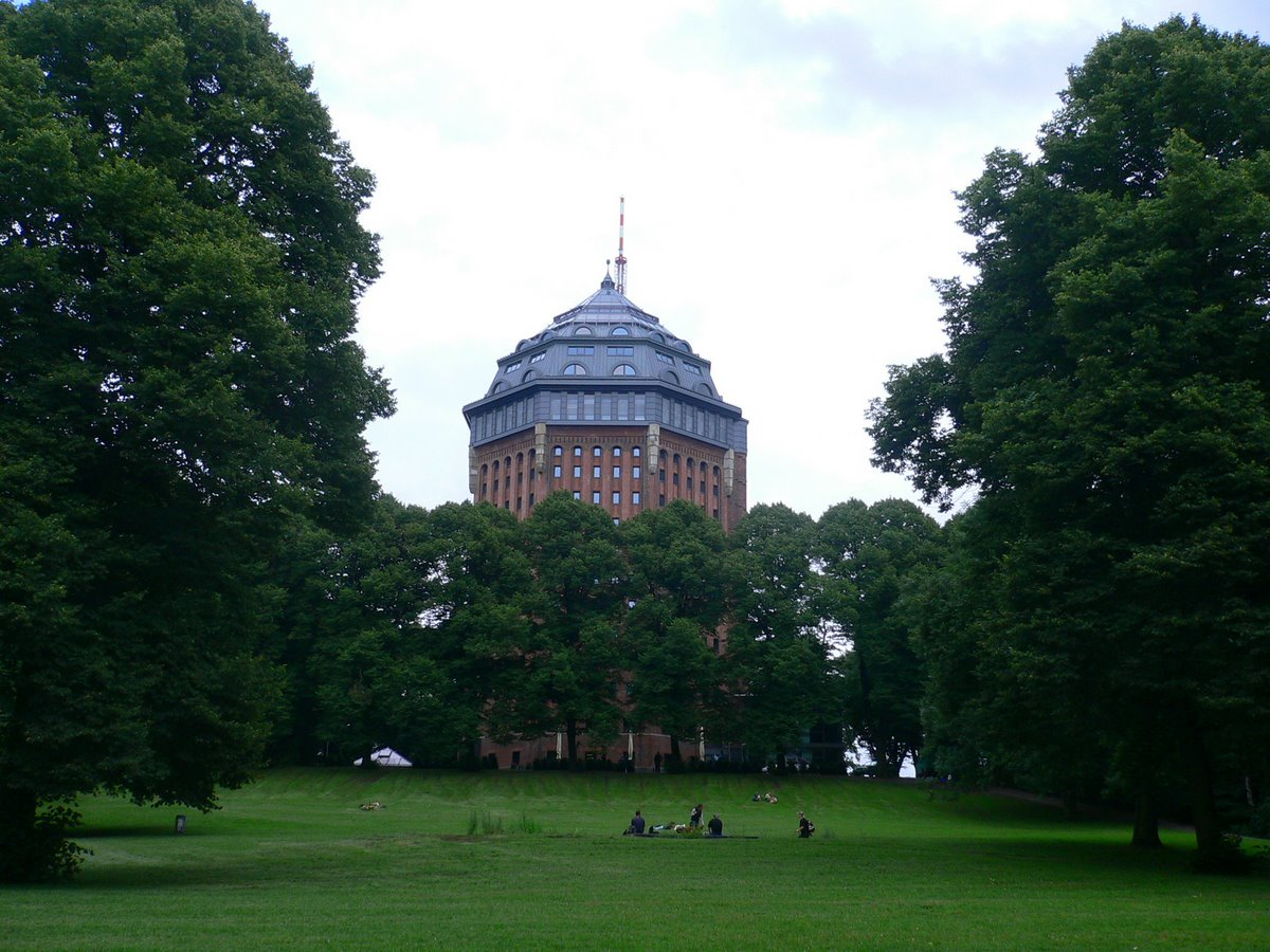 Schanzenpark Tower in Hamburg